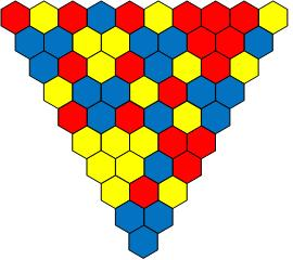 三角形三色問題として自分で作成した図である。